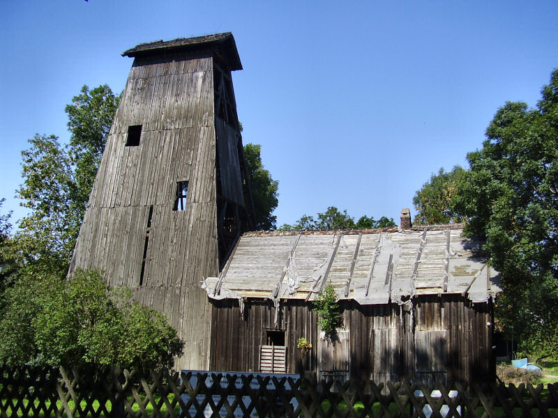 Solebohrturm in Darnstedt, Niedertrebra